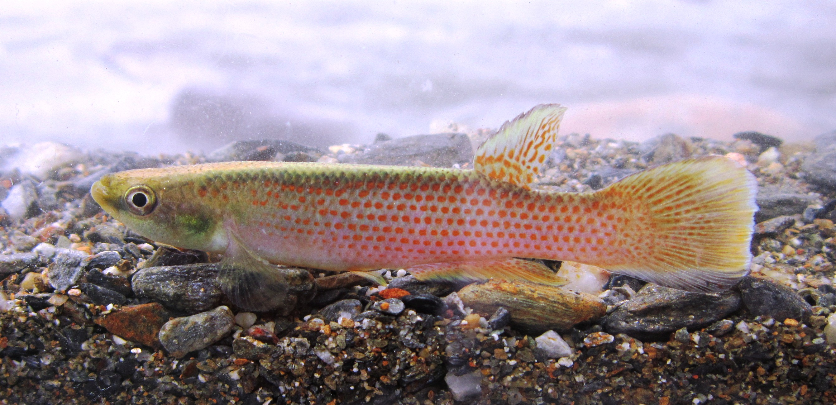 Rivulus magdalenae